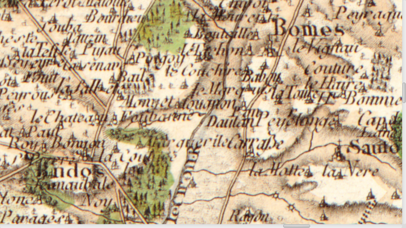 Carte de Cassini n°105 (Gironde, zoom sur Fontbanne), 1756